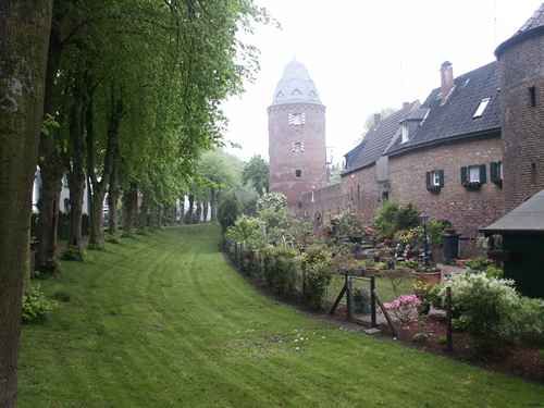 Kranenburg (Nederrijn, Duitsland): Kranenturm